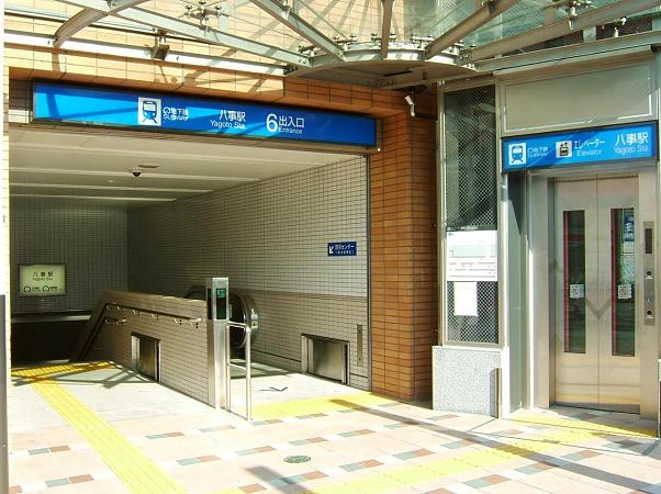 名古屋市昭和区広路町字北石坂に所在する名古屋市営地下鉄名城線・鶴舞線八事駅の6番出入口。